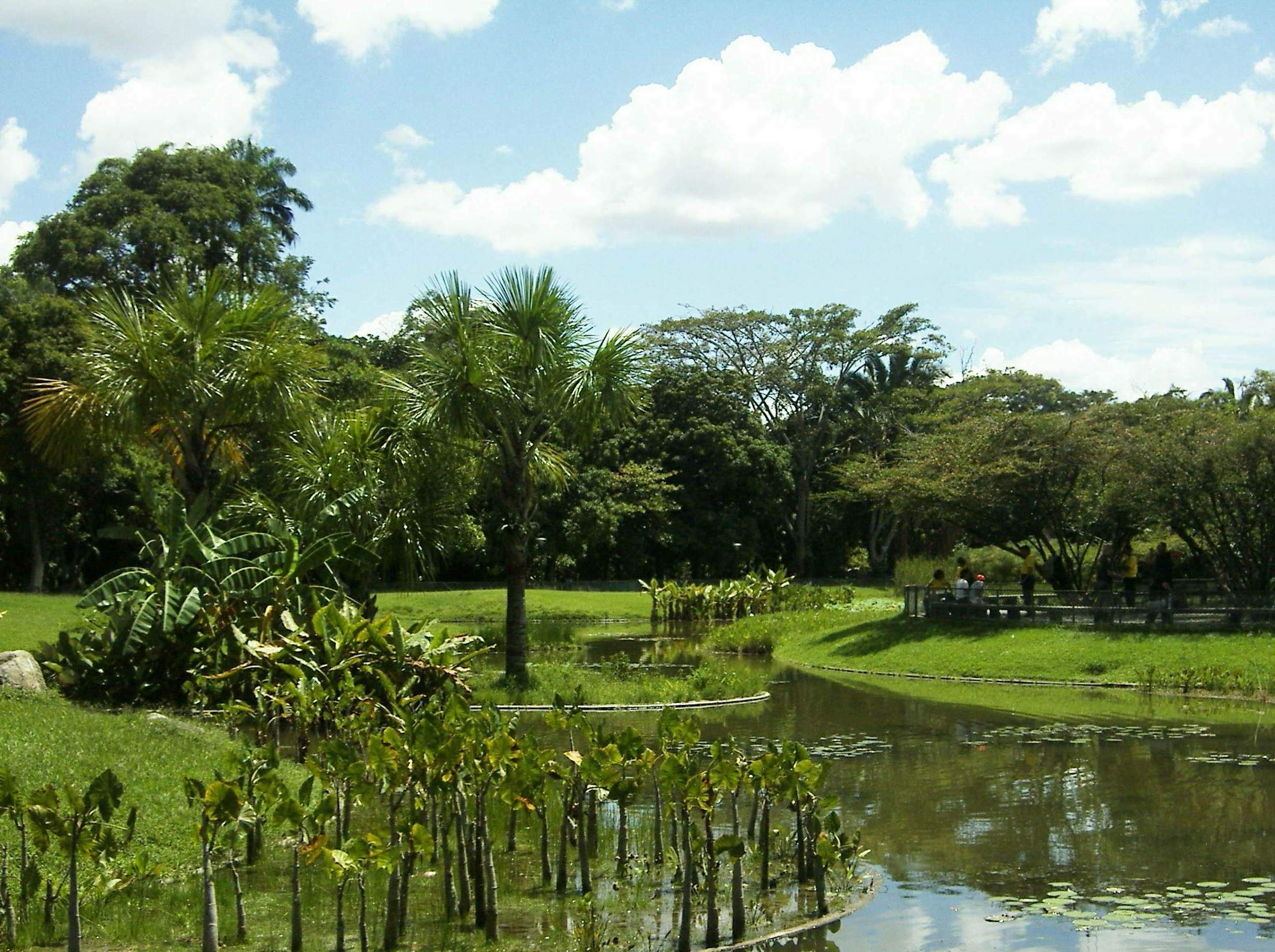 Lagos Parque del Este, Caracas Venezuela